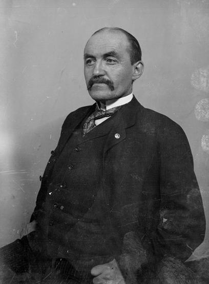 Honoré Jackson, Chicago, Illinois